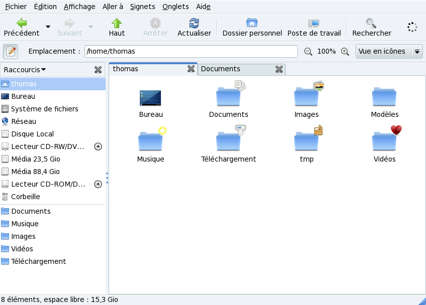 Nautilus dans Mandriva 2009.